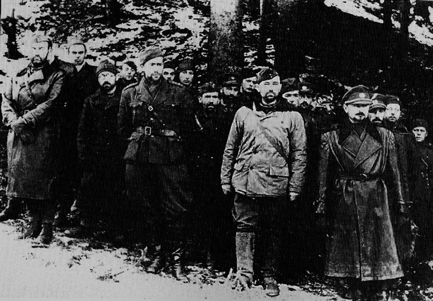 Slovenské národní povstrání-ústup do hor-ve světlé bundě letec Stanislav Rejthar- 1944Slovenčina: Skupina dôstojníkov 2. československej paradesantnej brigády na povstaleckom území. V popredí zľava: štábny kapitán Srp, štábny kapitán Marcely, štábny kapitán Rajter, major Ďumbala.[1]